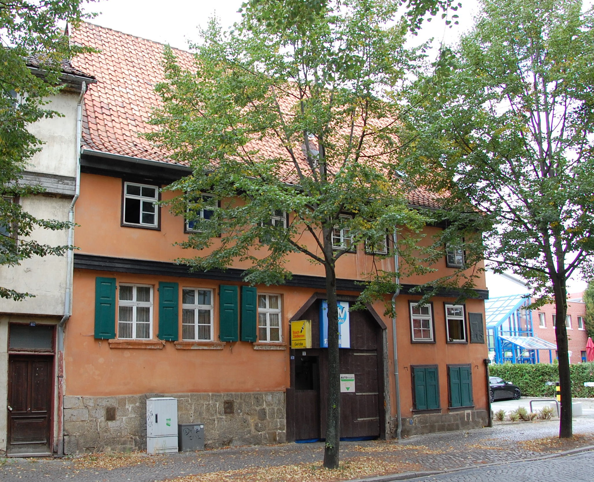 Haus Steineg 43 in Quedlinburg